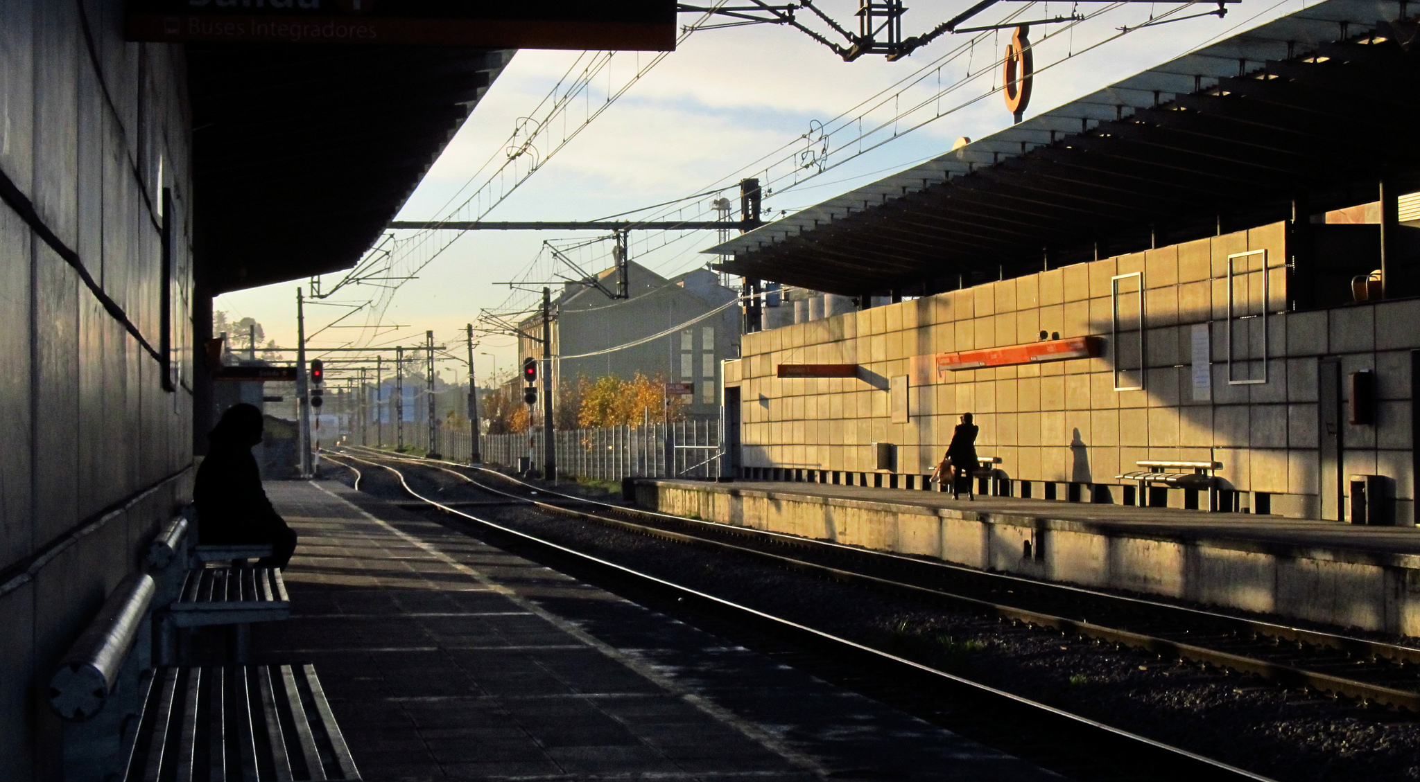 Andén de la Estación Concepción.